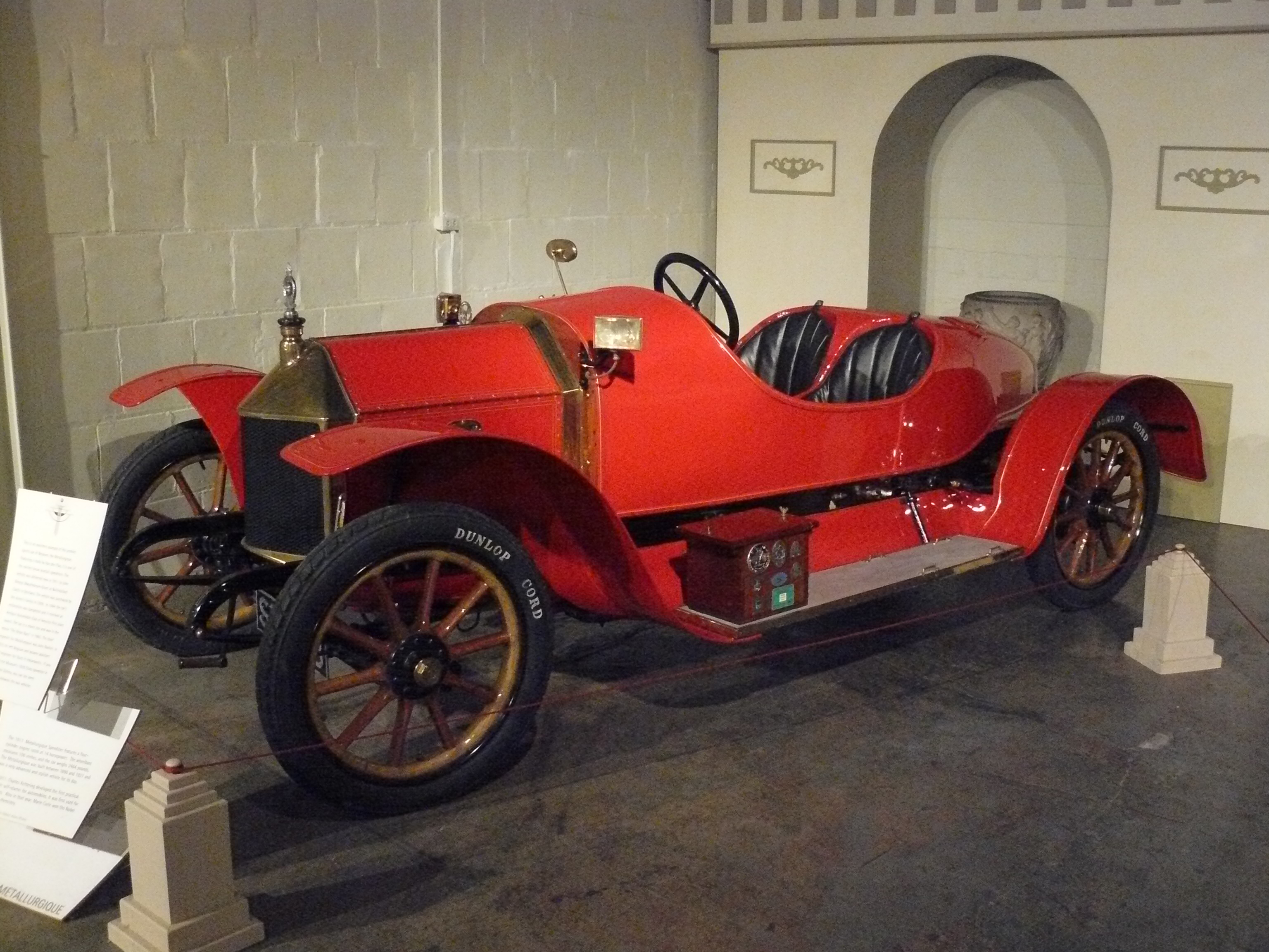 Auburn/Cord Muséum 2013